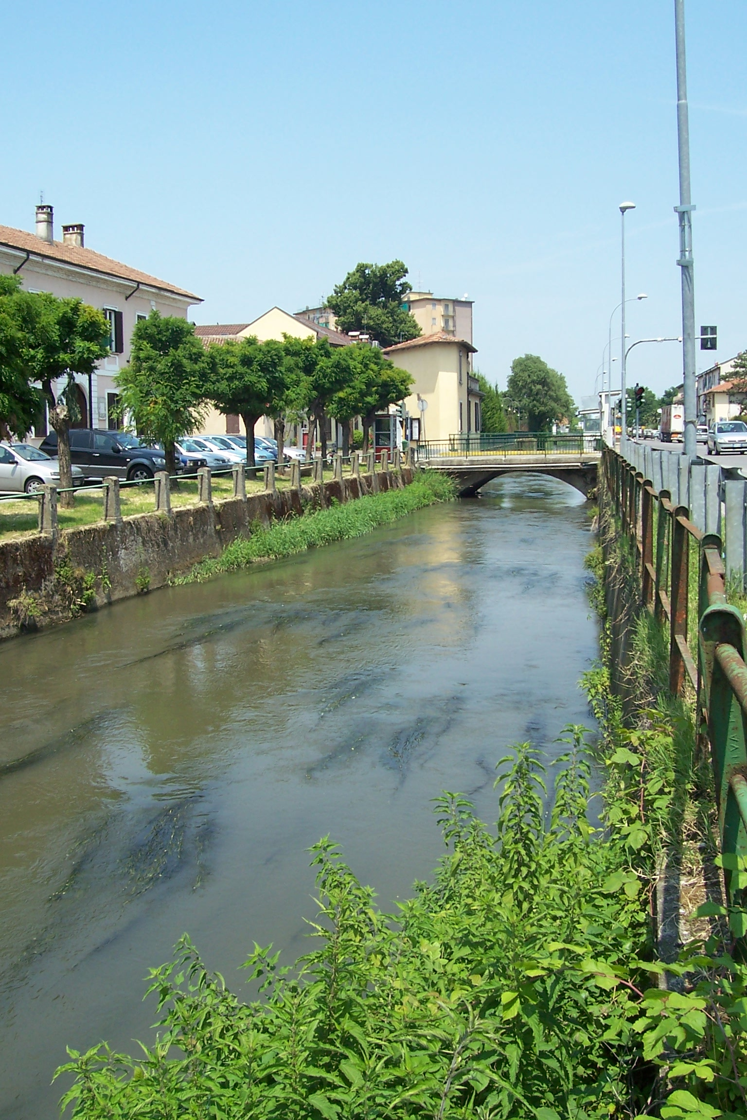 il Navigliaccio a Casarile